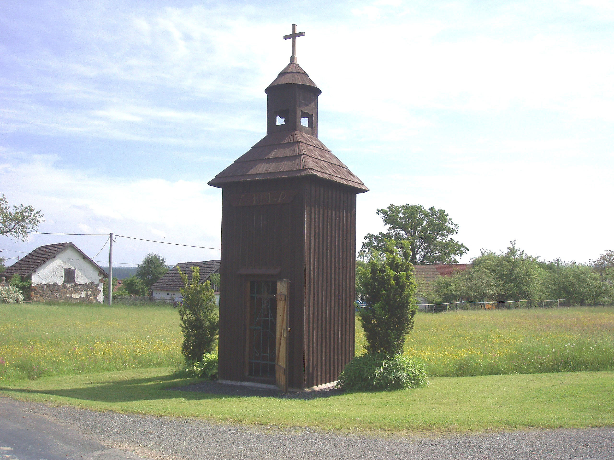 Planiny - kaple z roku 1931